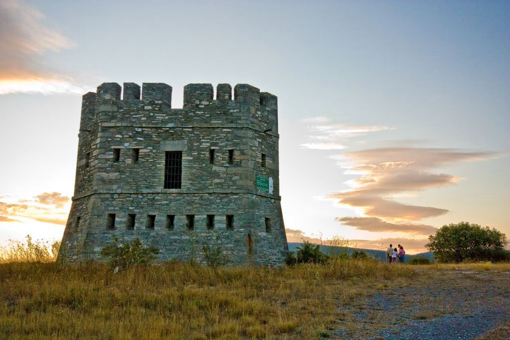 Torre Vayagüen, Nanclares de la Oca (Iruña de Oca, Álava).